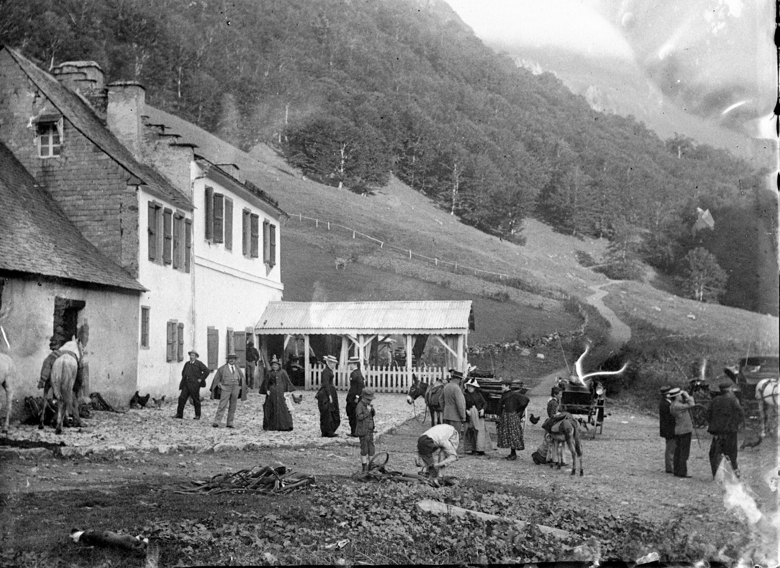 Hospice de France, Luchon (Haute-Garonne, France), congrès du CAF, 10 septembre 1893 Fonds Trutat - Photographie ancienne Cote : TRU C 24 Localisation : Fonds ancien Original non communicable Titre : Congrès de Luchon, CAF, [Hospice de France], 10 septembre 1893 Auteur : Trutat, Eugène Rôle de l’auteur : Photographe Lieu de création : Bagnères-de-Luchon (Haute-Garonne ; canton) Date de création : : 1893 Mesures : 5 x 6 cm Observations : Cliché pris à l'occasion du congrès du Club alpin français de Luchon en 1893. Mot(s)-clé(s) : -- Alpinisme -- Congrès -- Divertissement et sport -- Homme -- Femme -- Cheval -- Voiture à attelage -- Montagne -- Vallée -- Refuge (montagne) -- Ecurie -- Club alpin français. Section (Pyrénées centrales) -- Bagnères-de-Luchon (Haute-Garonne ; canton) -- Hospice de France (Bagnères-de-Luchon) -- Pique (France ; vallée) -- Venasque, Port de (France ; col) -- Luchonnais, Massif du (France) -- 19e siècle, 4e quart Médium : Photographies -- Noir et blanc -- Négatifs sur plaque de verre -- Scènes -- Paysages de montagne Bibliographie : Club Alpin Français. - Annuaire : vingtième année 1893. - Paris : Club Alpin Français, 1894. - 534 p. ; 23 cm. Lévy (André). - Le dictionnaire des Pyrénées : encyclopédie illustrée. - Toulouse : Privat, 1999. - 922 p ; 32 cm. cf. p. 860 Frappé (Jean-Bernard). - Autrefois Bagnères de Luchon. Tome II. - Anglet : Atlantica, 2001. - 297 p. ; 15 x 22 cm. - (Autrefois) cf. p. 196-201 Voir : TRU C 242 Hospice de France : en bas de la Maladetta, Luchon TRU C 248 Hospice de France, Luchon [environs] Bibliothèque de Toulouse. Domaine public